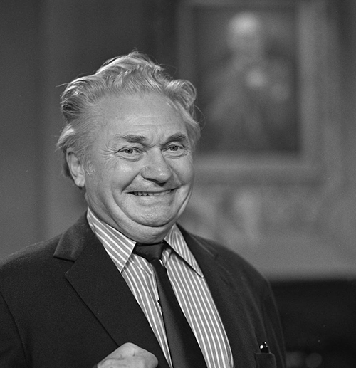 Cees Schouwenaar als Henk Pal in de Nederlandse televisieserie De lachende scheerkwast in 1981